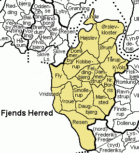 Fjends Herred, Gl. Viborg Amt, Denmark.